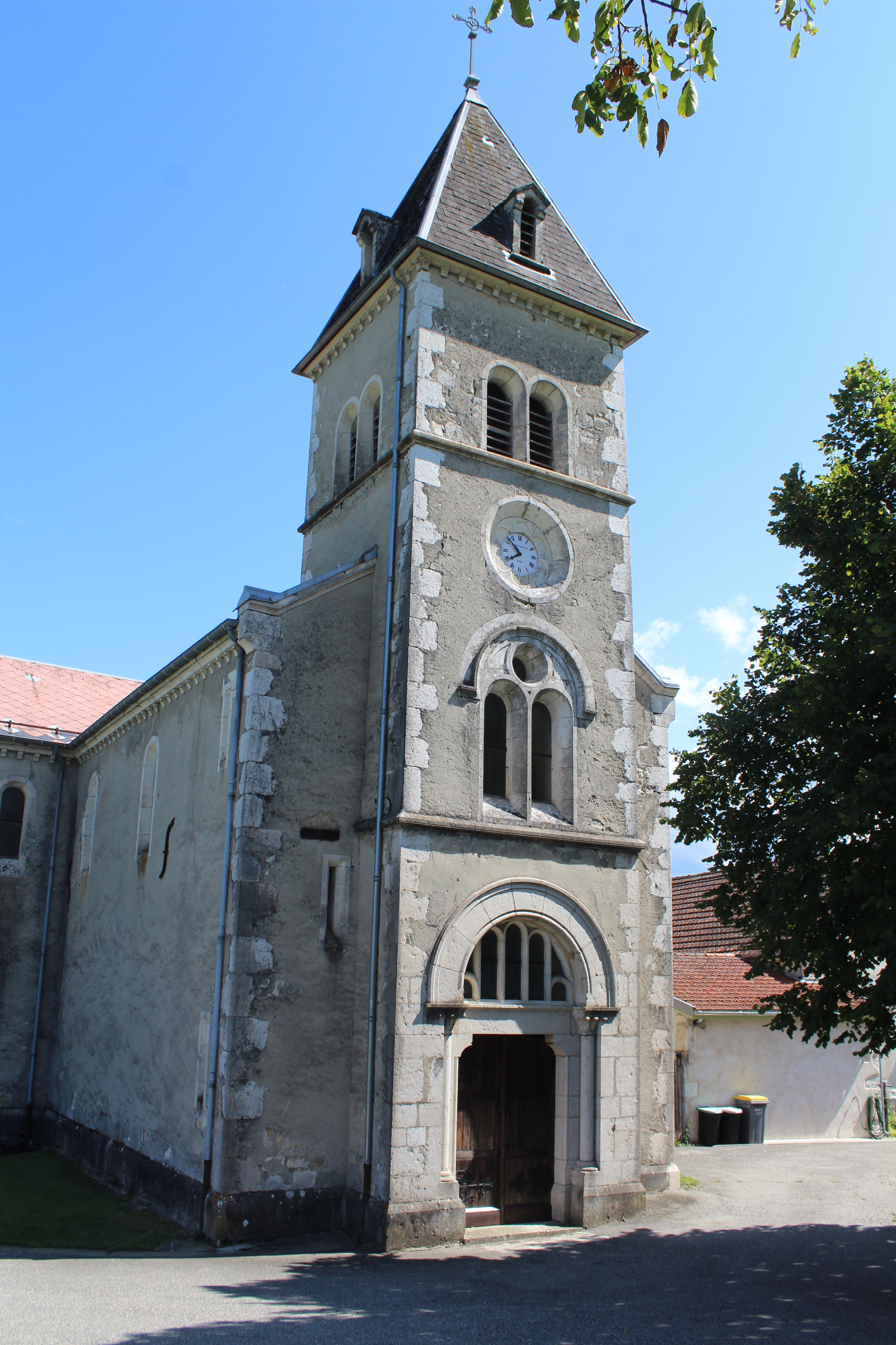 Église Saint-Jean-Baptiste de Lhôpital.